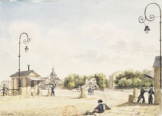 Le boulevard de l'Hôpital et l'hôpital de la Salpêtrière à Paris. Plume, encre de Chine et aquarelle, 7 x 9,7 cm, par Christophe Civeton (1796-1831), en provenance de la collection Hippolyte Destailleur.